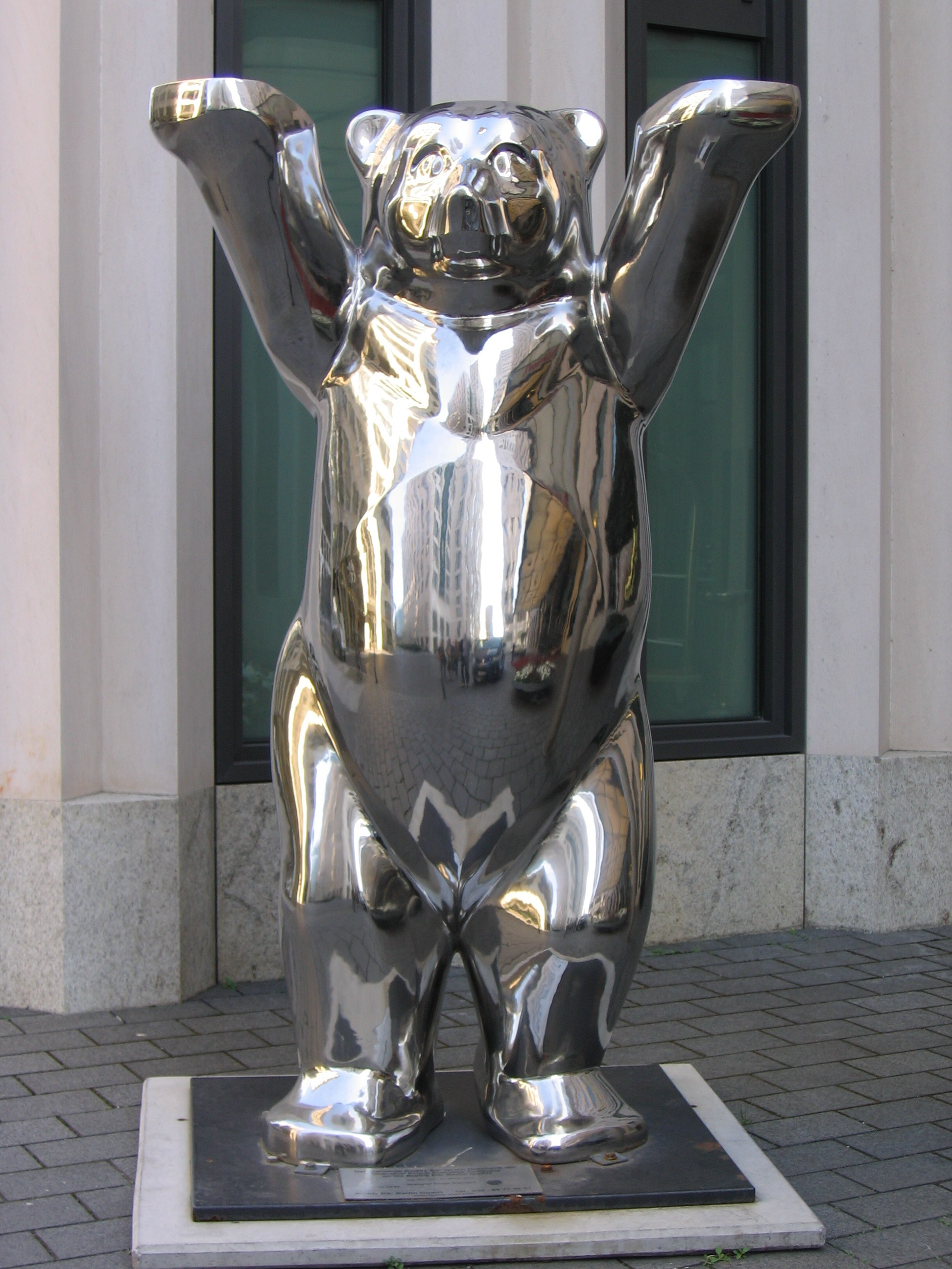 Stählerner Buddy Bear